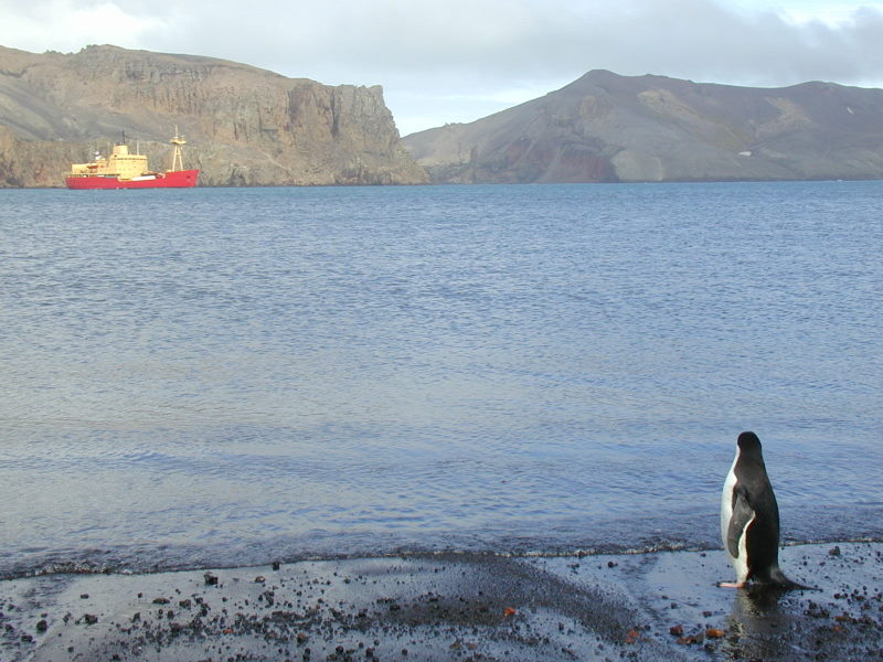 Isla Decepción, Antarctica, Chile